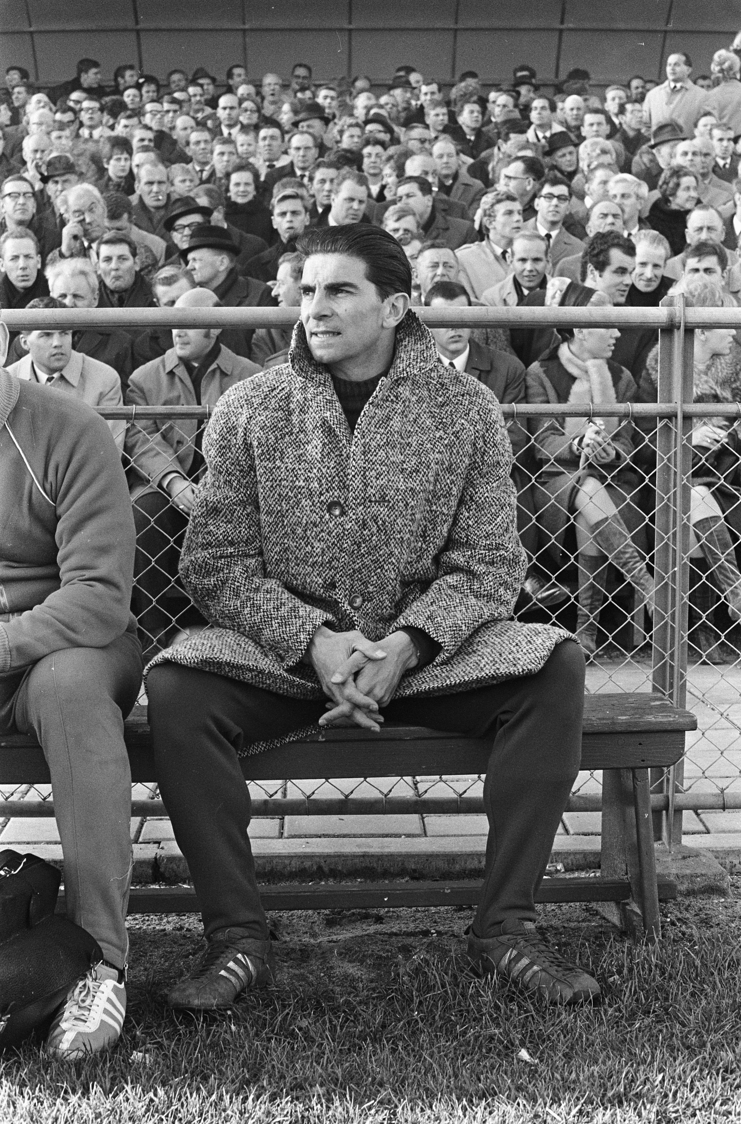 Match de football Volewijckers - Vitesse (1-2) à Amsterdam. Photographie de l'entraîneur du Vitesse Arnhem, Frans de Munck, par Pieter Jongerhuis / Anefo.